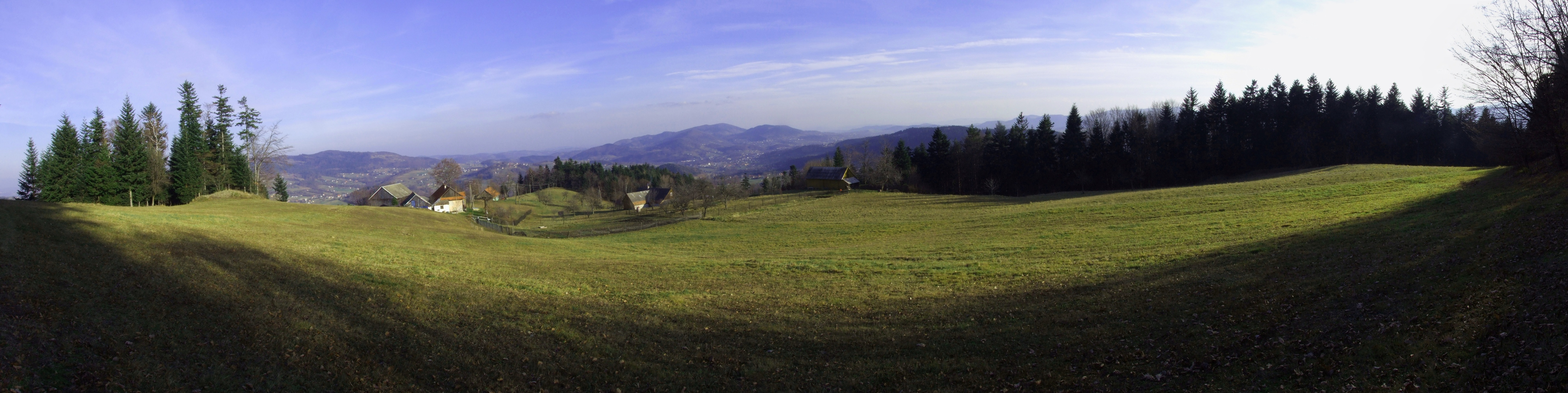 Szczytowa polana na Zęzowie